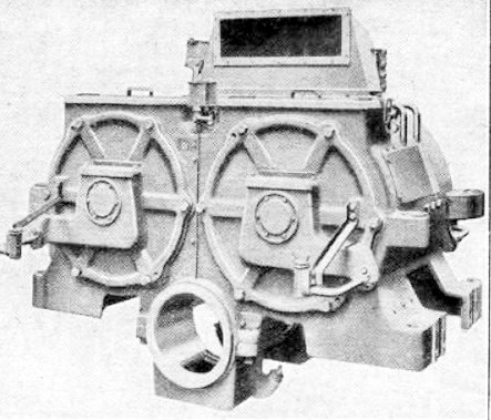 Doppelmotor der Lokomotive 262-AE vom Typ Oerlikon MBZ 660